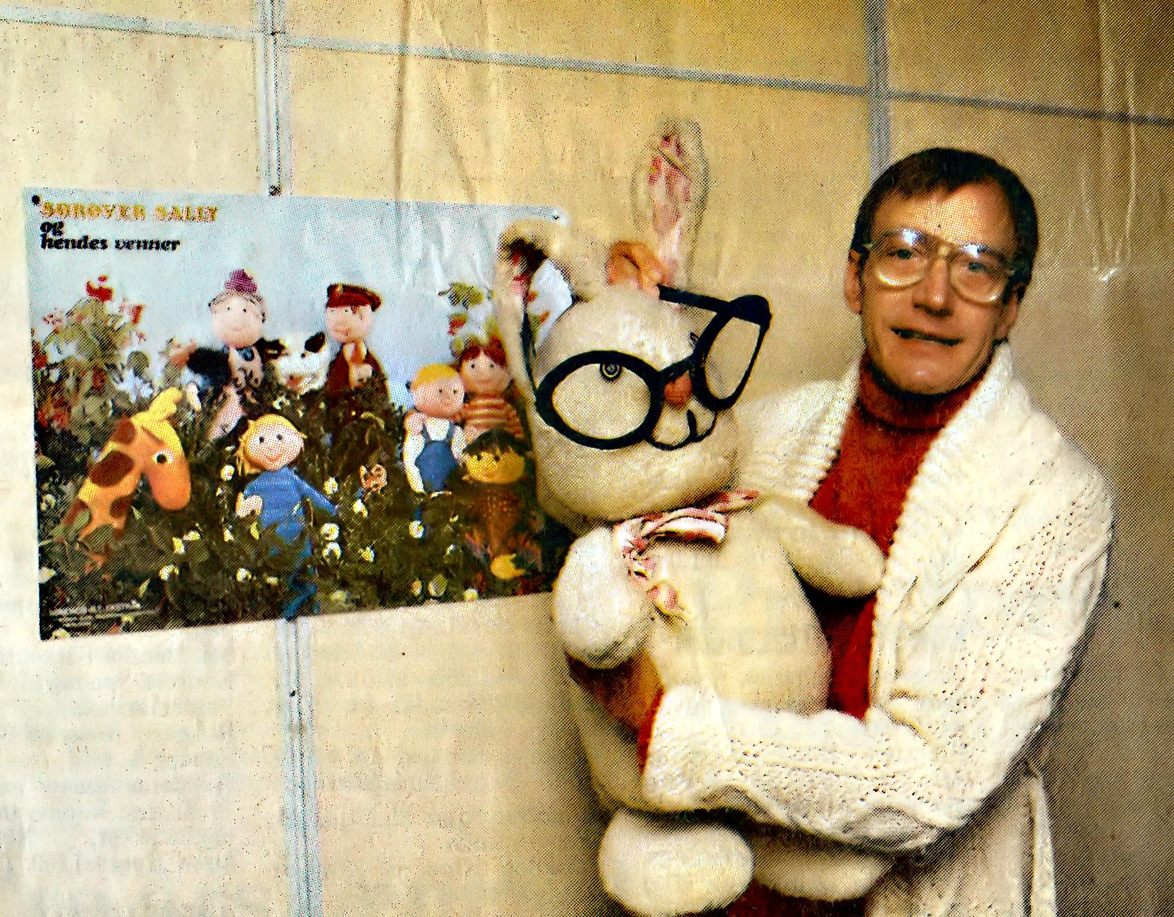 Per Nielsen med kaninen Albert, som han selv opfandt og ved plakat med Sørøver Sally